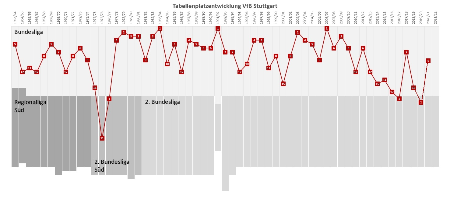 Tabellenplatzentwicklung VfB Stuttgart ab 1963/64